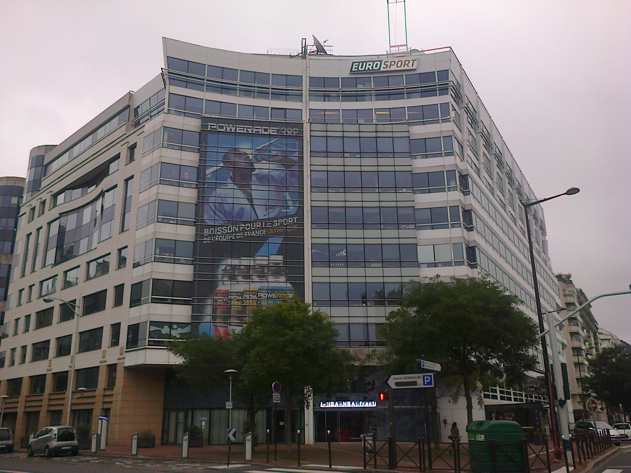 Siège français d'Eurosport à Issy-les-Moulineaux (Hauts-de-Seine, France).